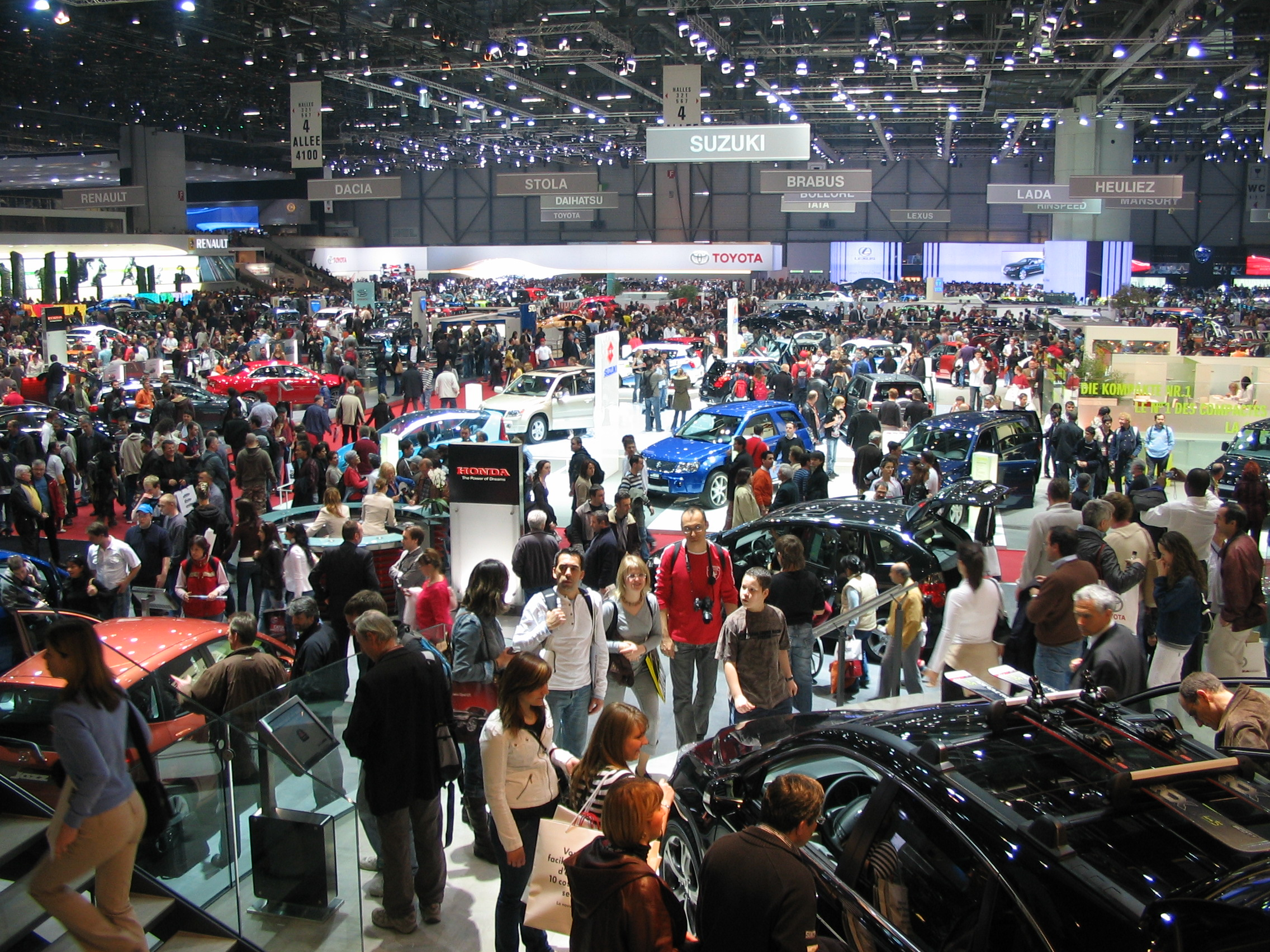 Affluence salon Genève 2007, dernier jour ouverture au public.